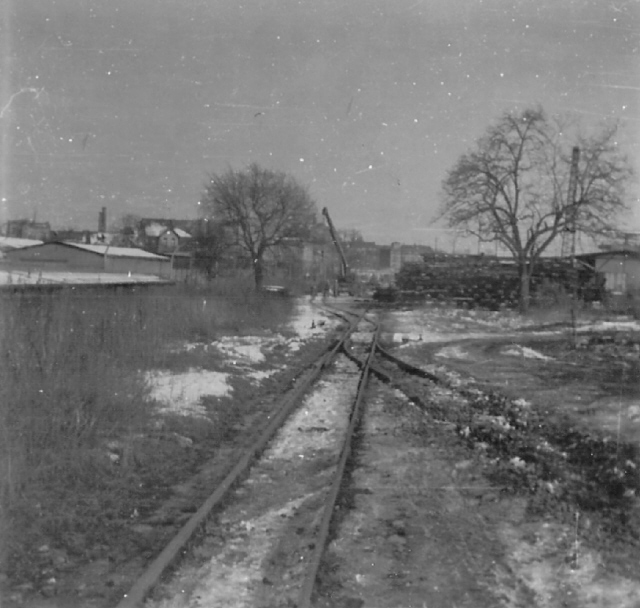 Abbau der Spreewaldbahn